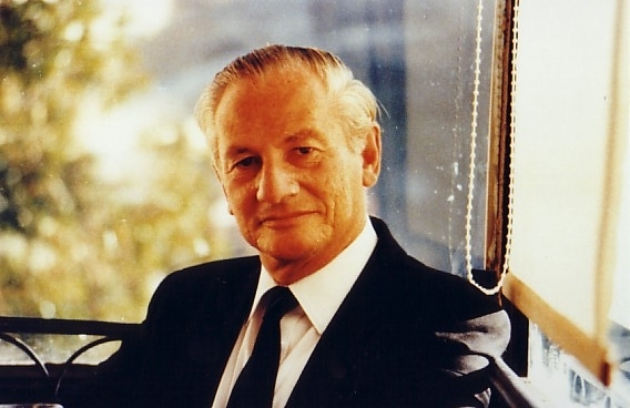 גבריאל בָּךְ (נולד ב-13 במרץ 1927) הוא משפטן ישראלי שכיהן כפרקליט המדינה (1969–1982) ושופט בית המשפט העליון (1982–1997). לאחר פרישתו כיהן כיושב ראש הוועדה המייעצת למינוי בכירים בשירות המדינה.